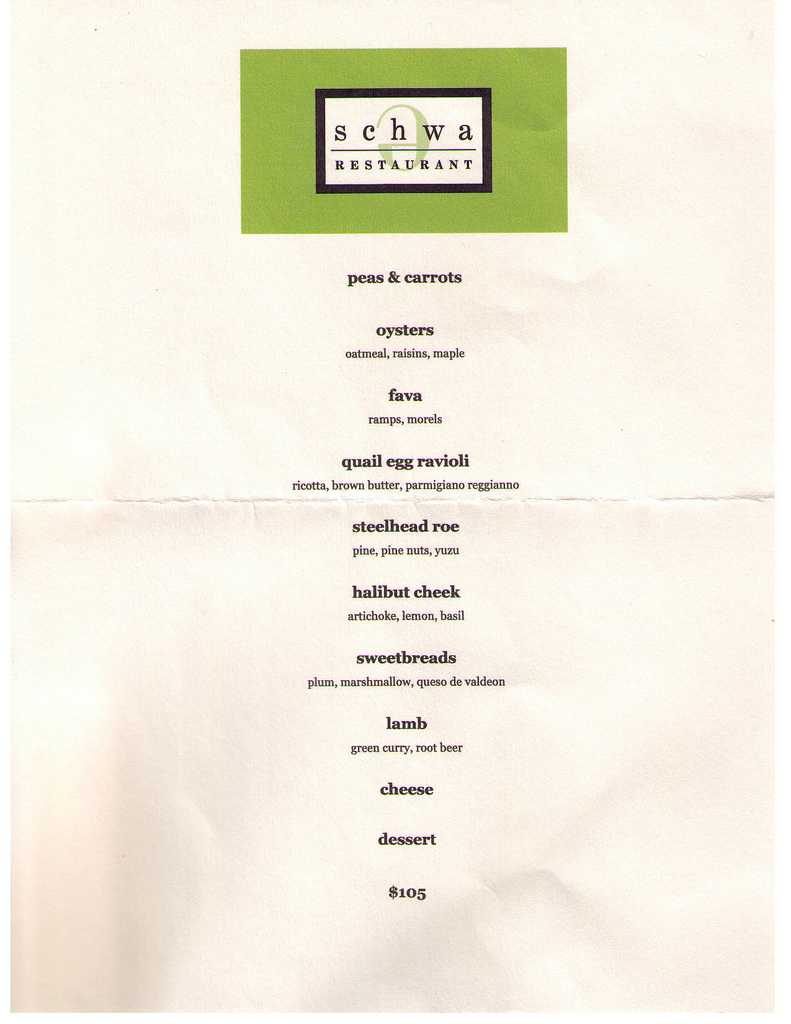 Schwa menu, circa 2007